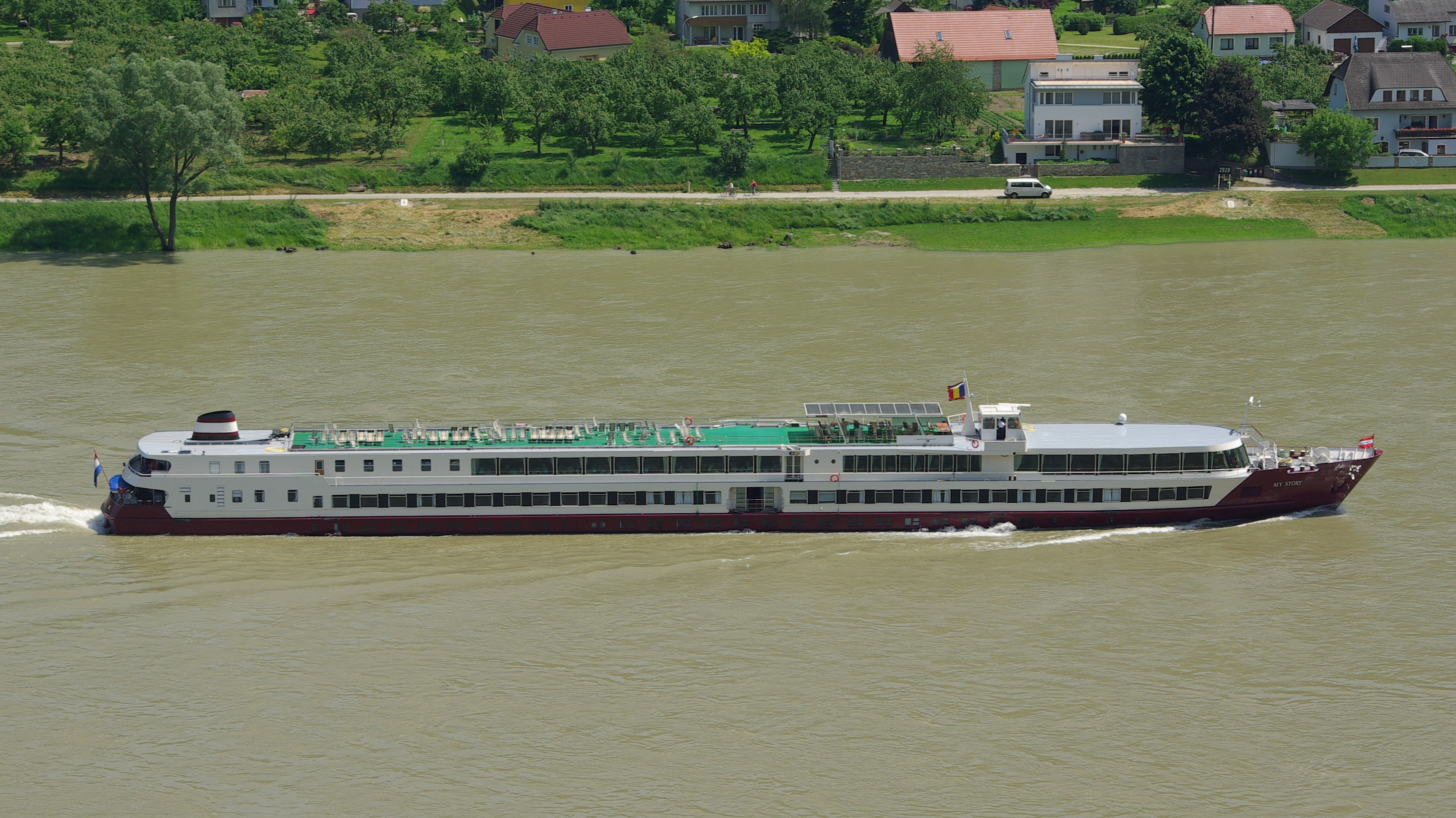 Das Passagierschiff My Story auf der Donau bei Spitz in Niederösterreich.